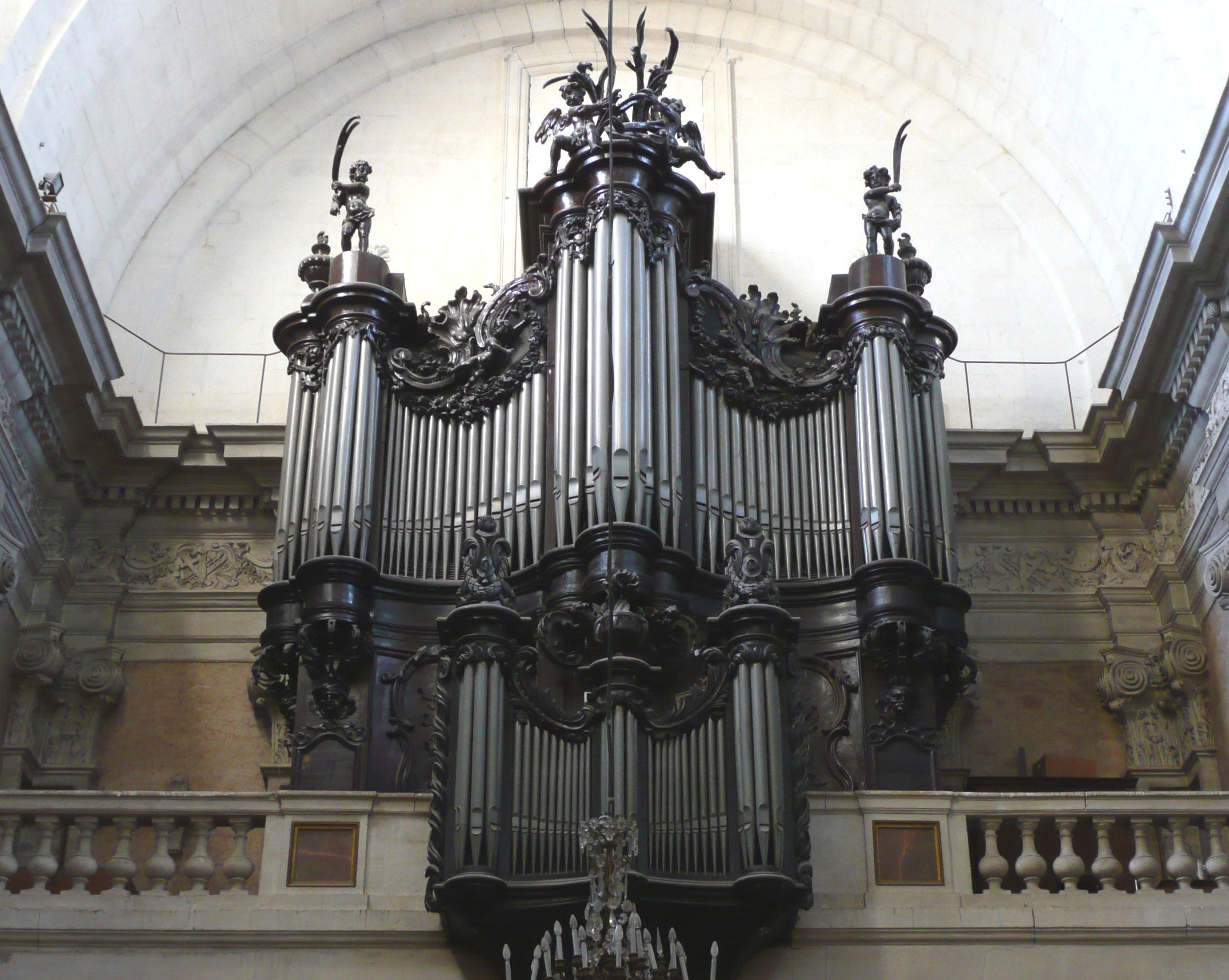 Le grand-corps du buffet est celui de l'orgue construit vers 1751 par Dom François Bedos de Celles pour l'abbaye de St Thibery (à 50 Km de Montpellier) et transféré après la révolution dans la basilique Notre-Dame des Tables de Montpellier (juste derrière le célèbre musée Fabre).